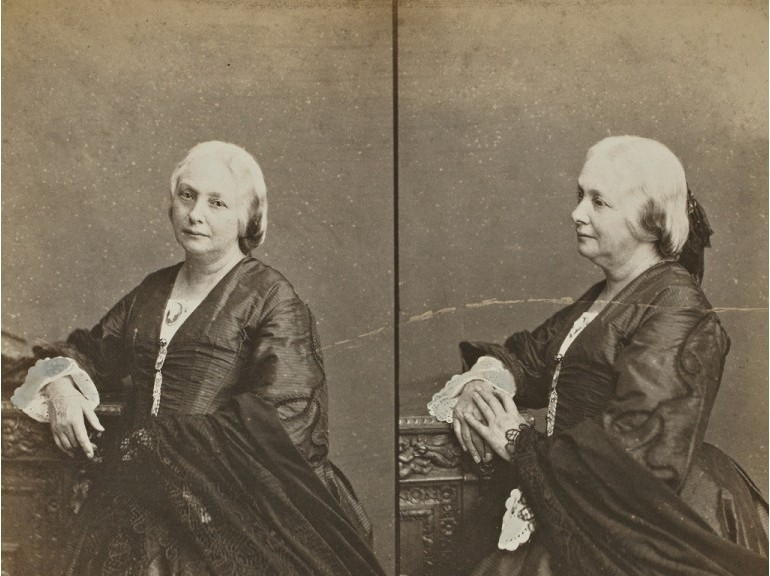 Double portrait de Juliette Drouet, Guémar frères, Bruxelles.